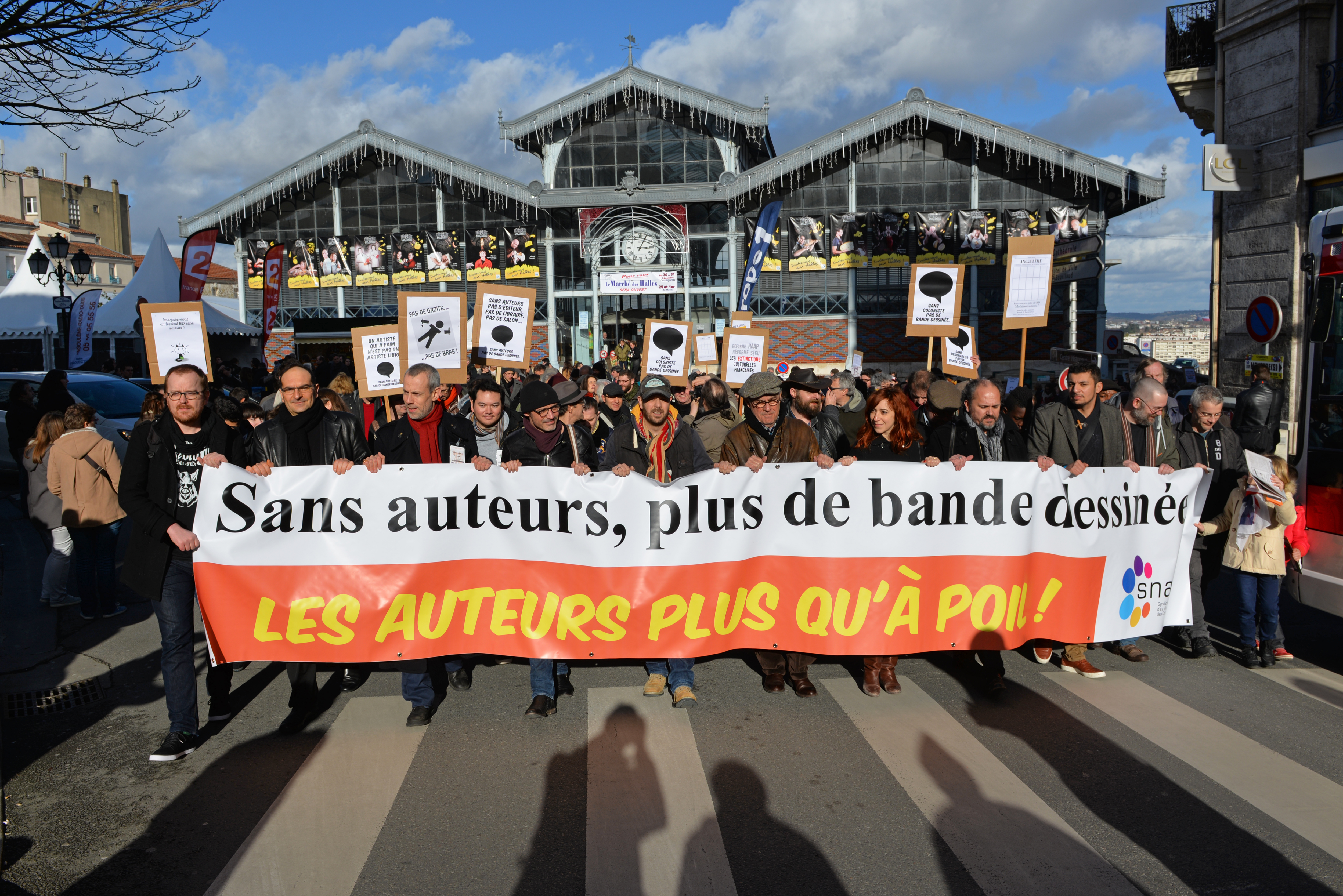 Marche des auteurs de bande dessinée le 31 janvier 2015 lors du Festival d'Angoulême.